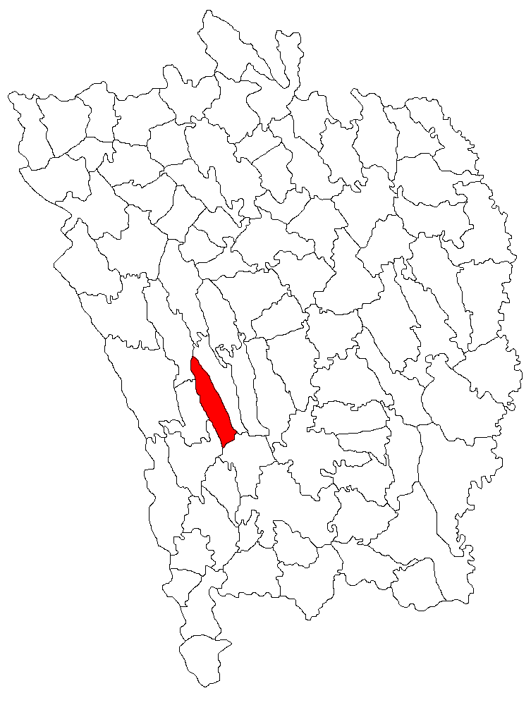 Categorie:Hărţi ale judeţului Vaslui